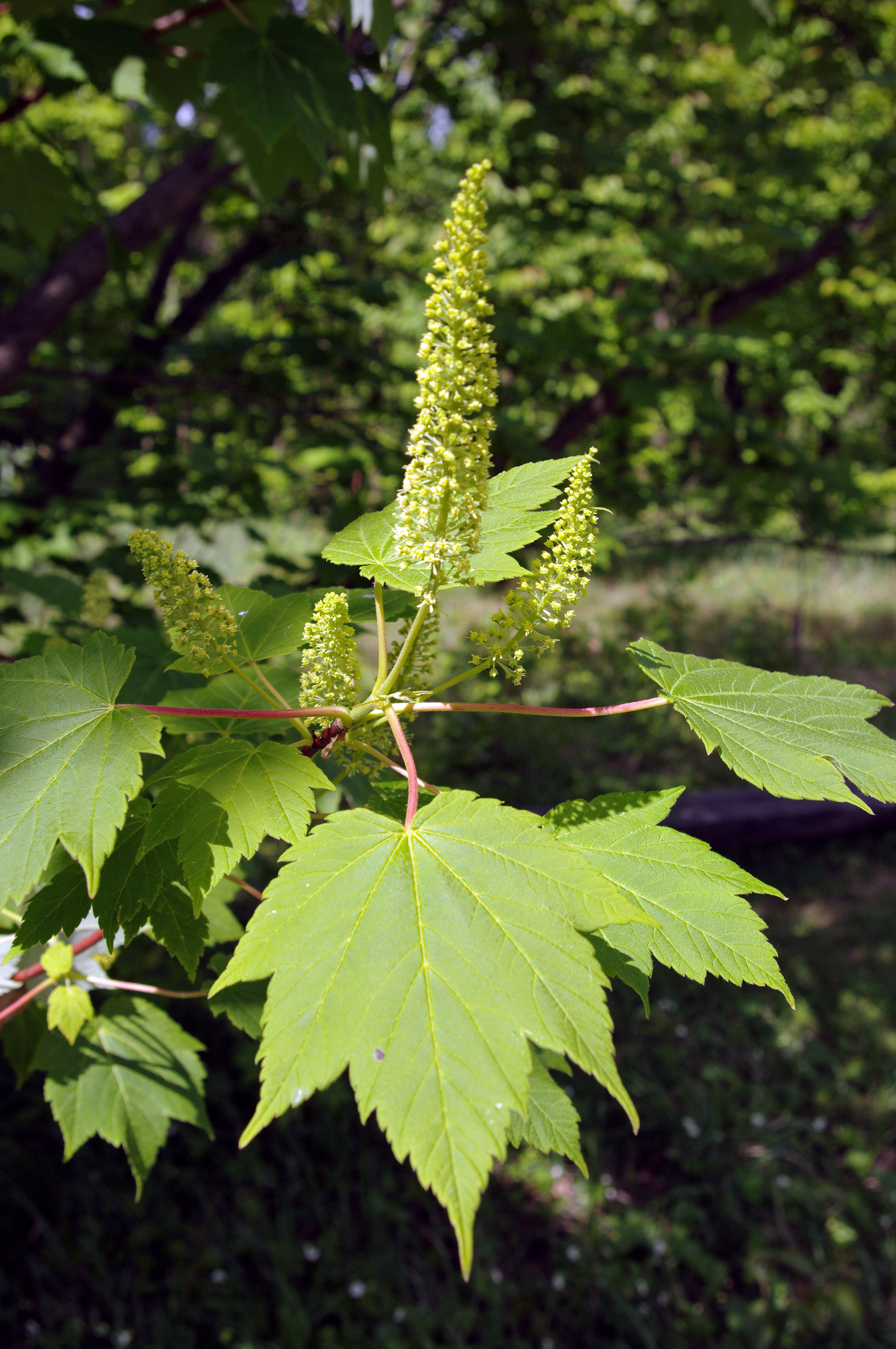 Acer caudatum ukurunduense